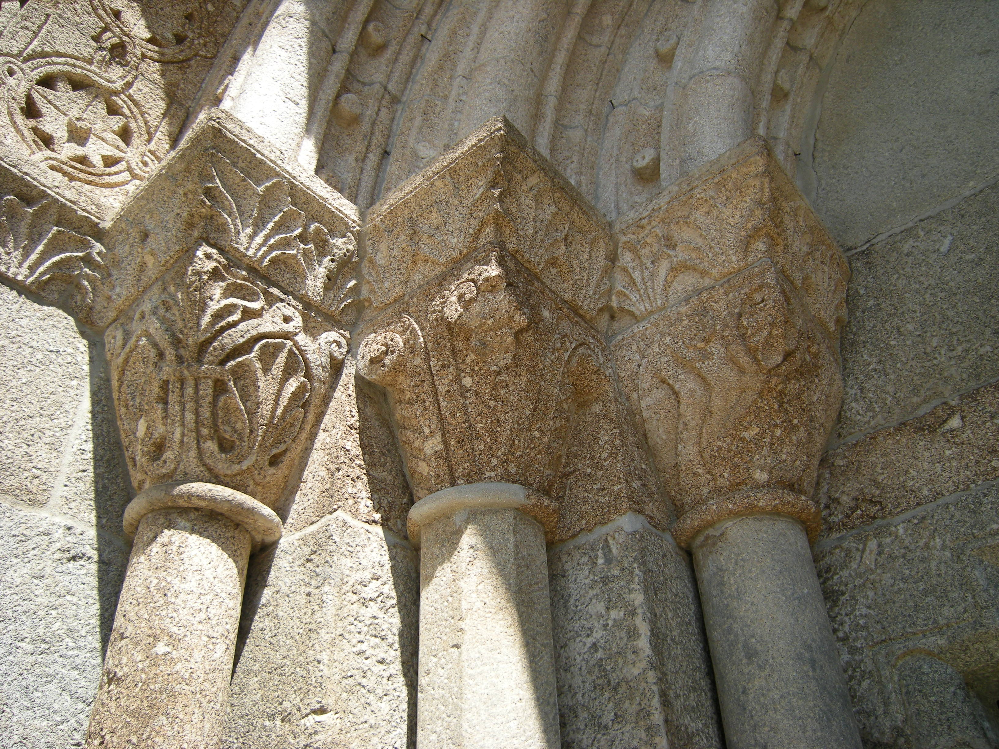 Capiteles de la portada occidental.